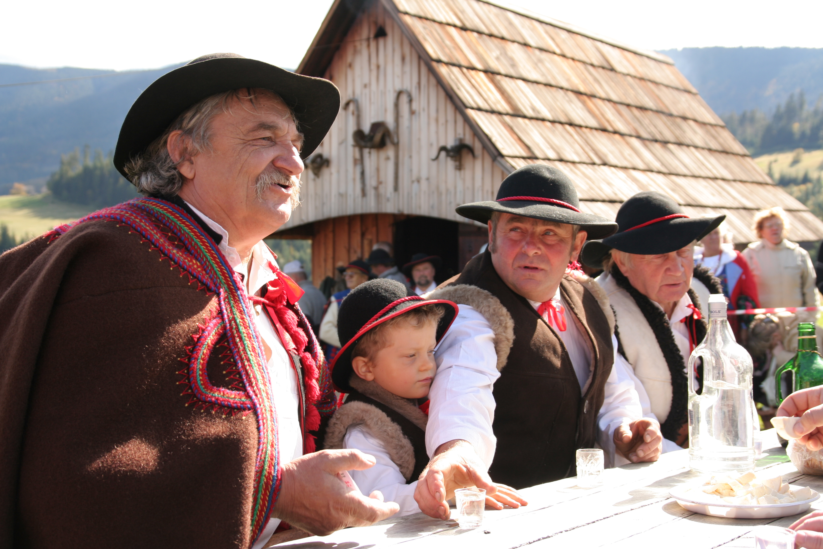 Redyk jesienny to inaczej osod, łosod, łossod. Nazwa pochodzi od nazwy osadzić, czyli odprowadzić owce do poszczególnych gospodarstw, po kilku miesięcznym pobycie stad na halach. Tradycyjne wypas owiec kończył się we wrześniu w dzień św Michała lub św. Wacława.